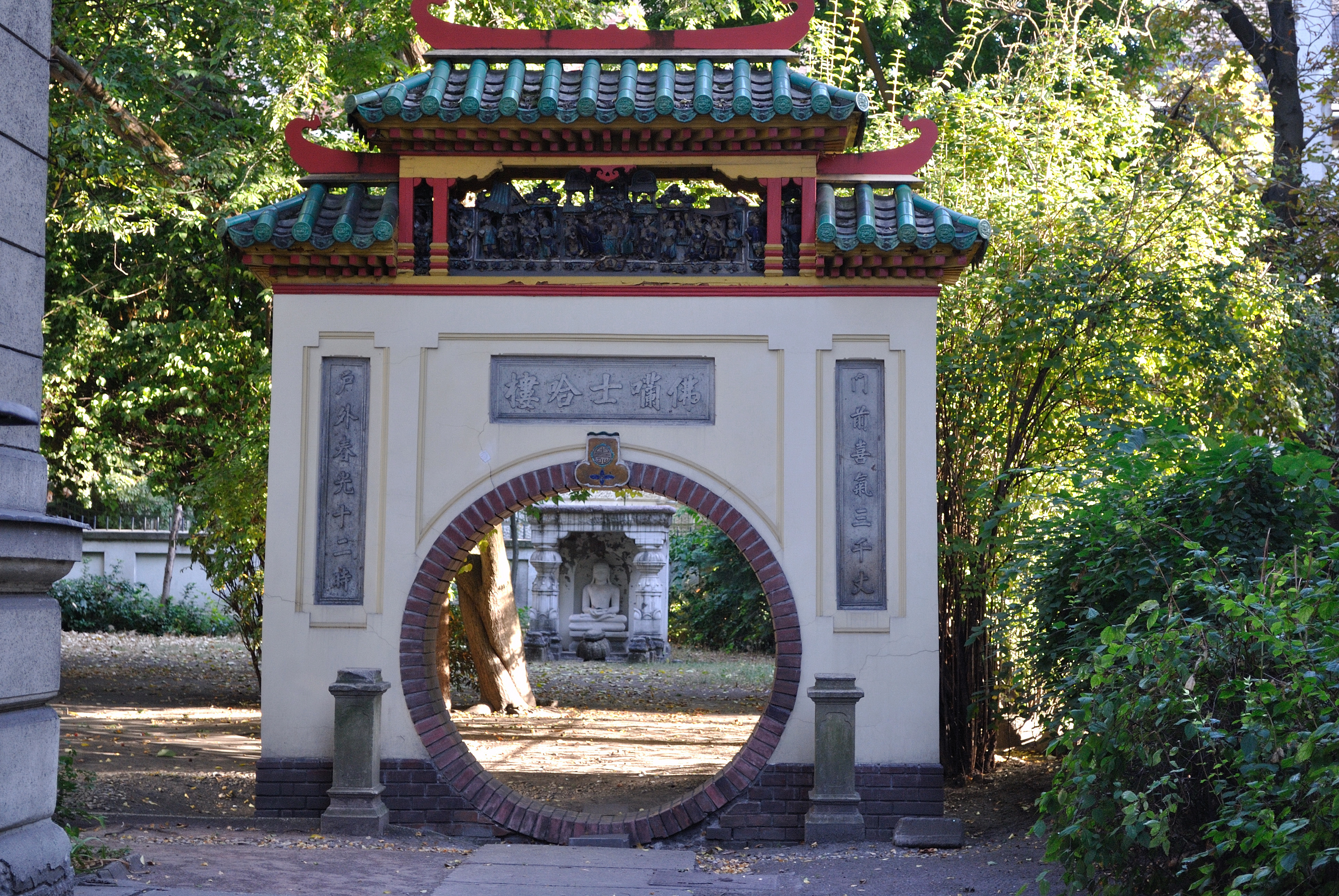 Knorr-villa (majd Hopp-villa) történeti kertje (Budapest 6, Andrássy út 103.)